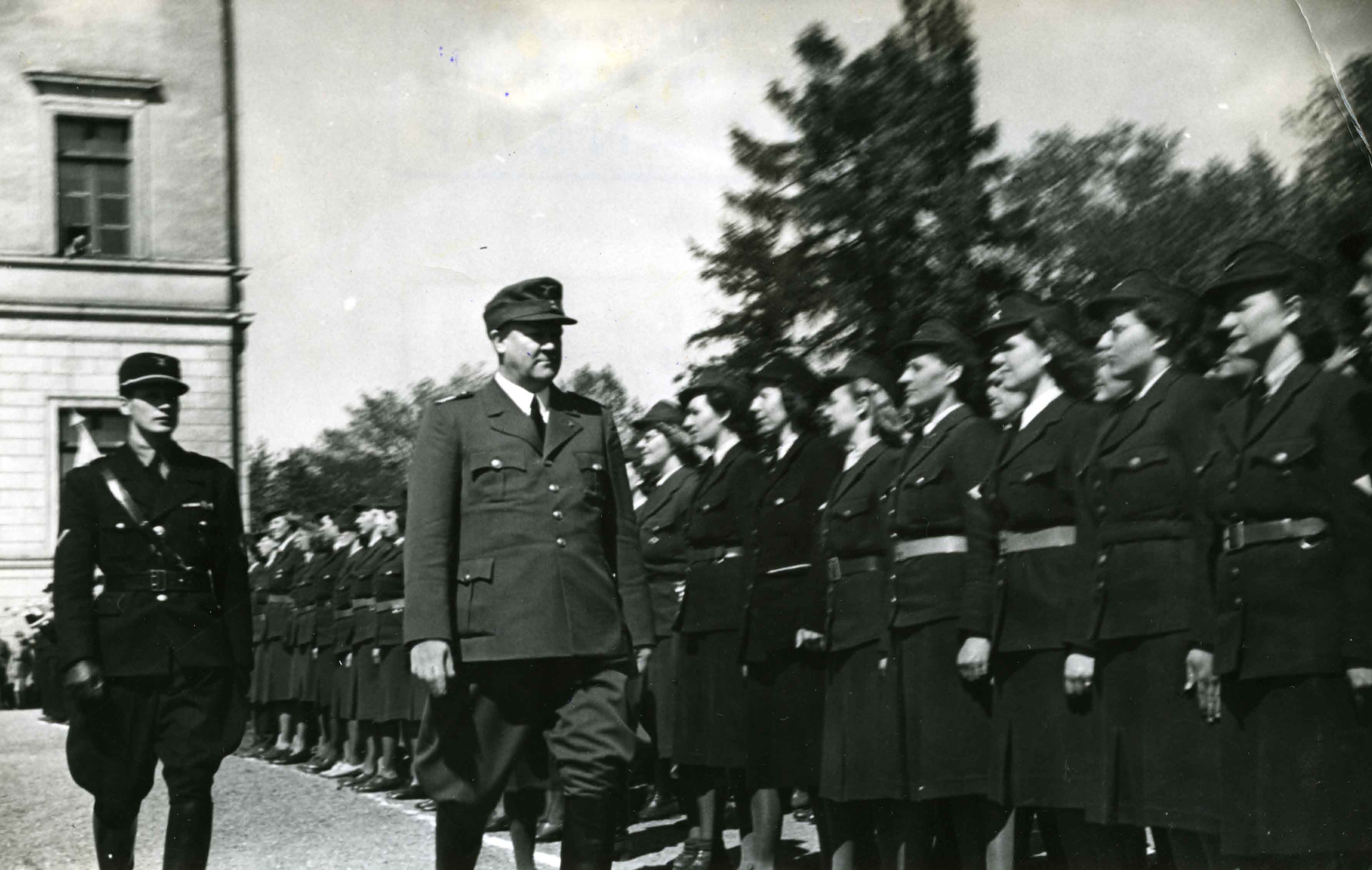 Aftenposten tirsdag morgen 18. mai 1943: «Appellen på Slottsplassen i går. Ministerpresidenten takker sine kampfeller for 10 års innsats. [...] Ministerpresidenten mottok om formiddagen en rekke gratulasjoner på Slottet og kl. 12 ble det holdt en høytidelig appell med oppmarsj av ulike uniformerte æresavdelinger.»Fotograf: NSUF RA/PA-0781/Fa/0001/0004 (1139)